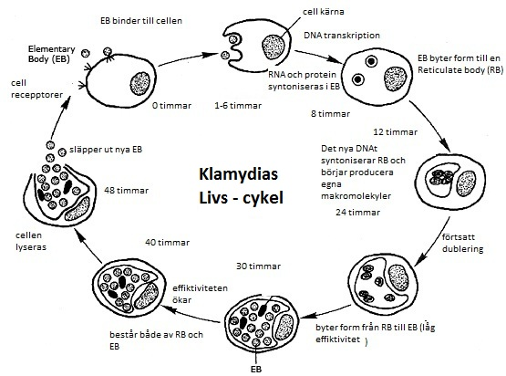 chlamydia life-cycle